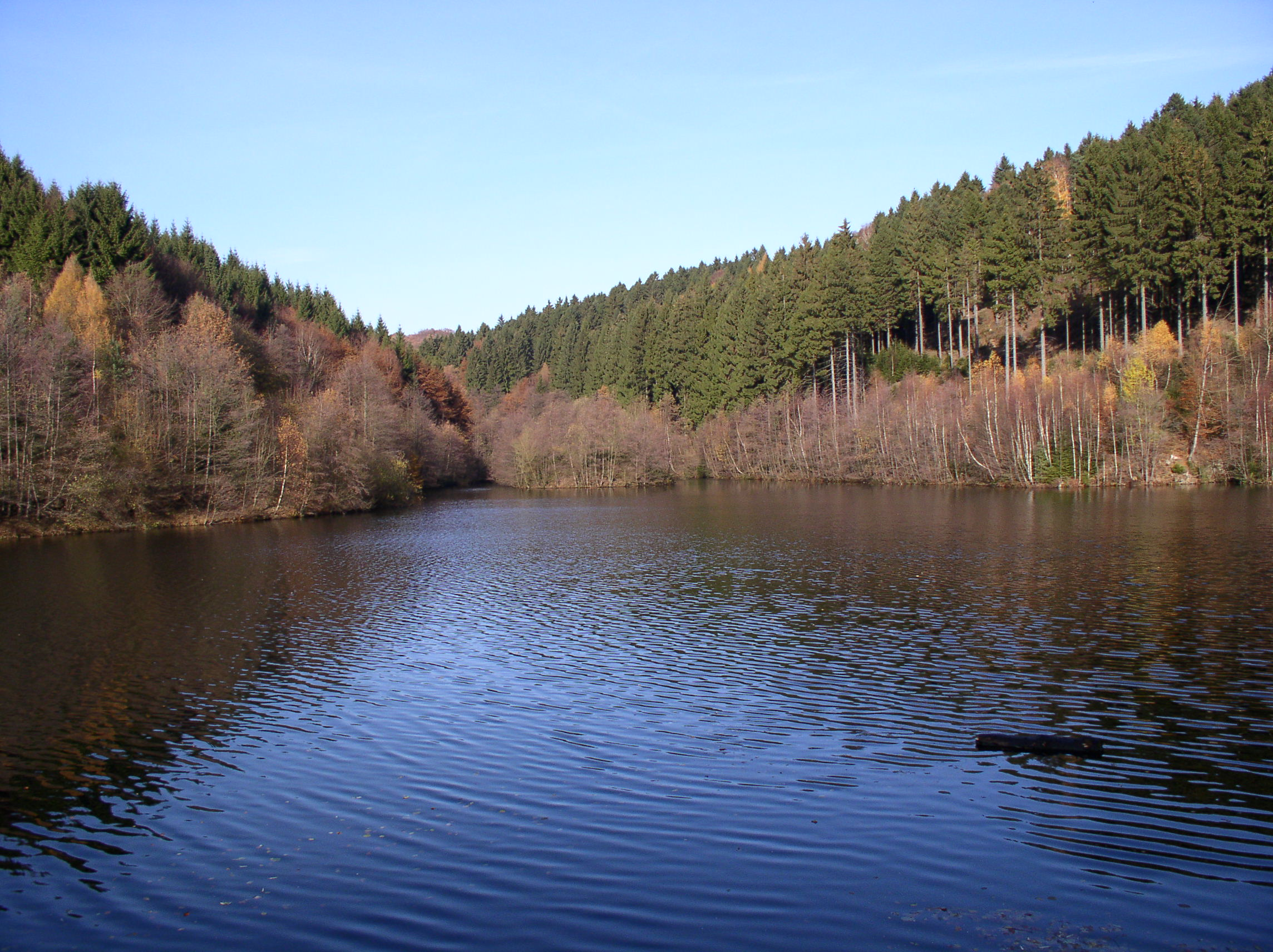 Wiebach-Vorsperre der Wuppertalsperre / Wiebach bassin of the Wupper dam